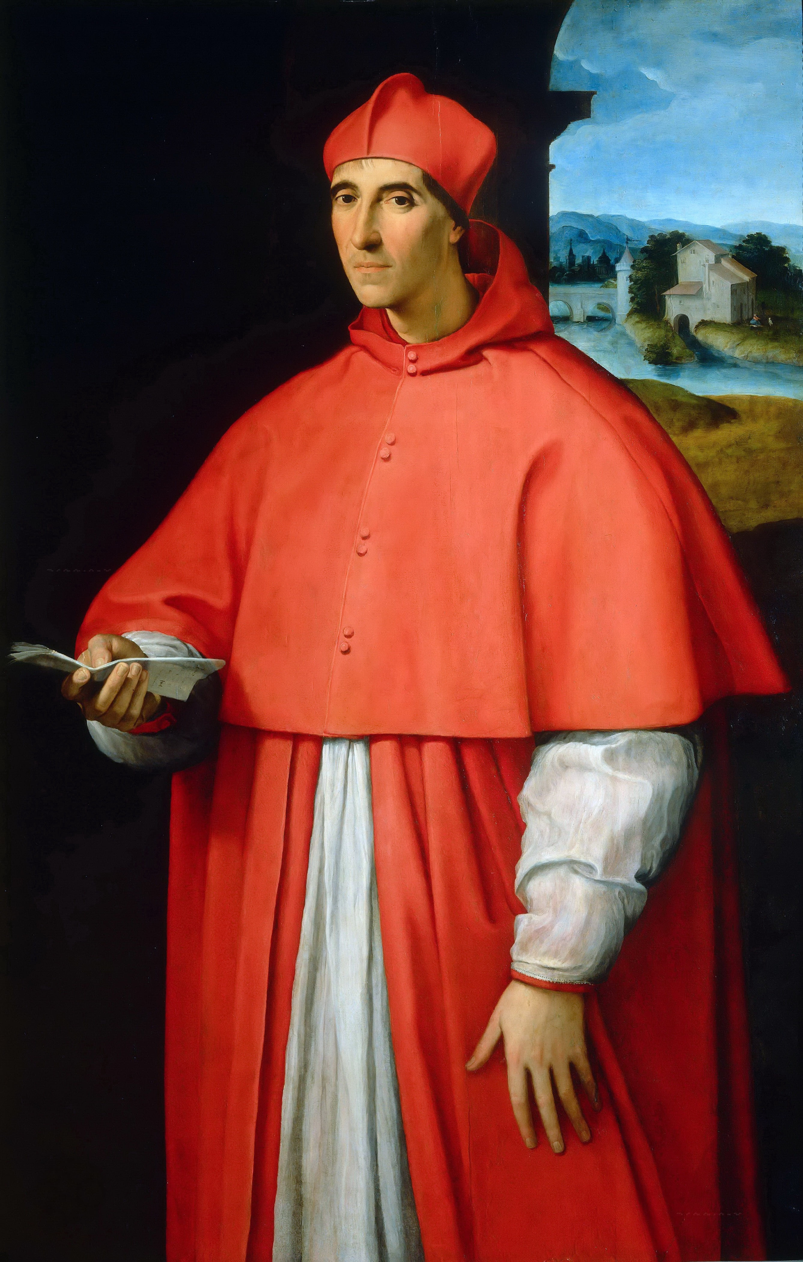 Ritratto del cardinale Alessandro Farnese, futuro papa Paolo IIIPotrait of Cardinal Alessandro Farneselabel QS:Lit,"Ritratto del cardinale Alessandro Farnese, futuro papa Paolo III"label QS:Len,"Potrait of Cardinal Alessandro Farnese"